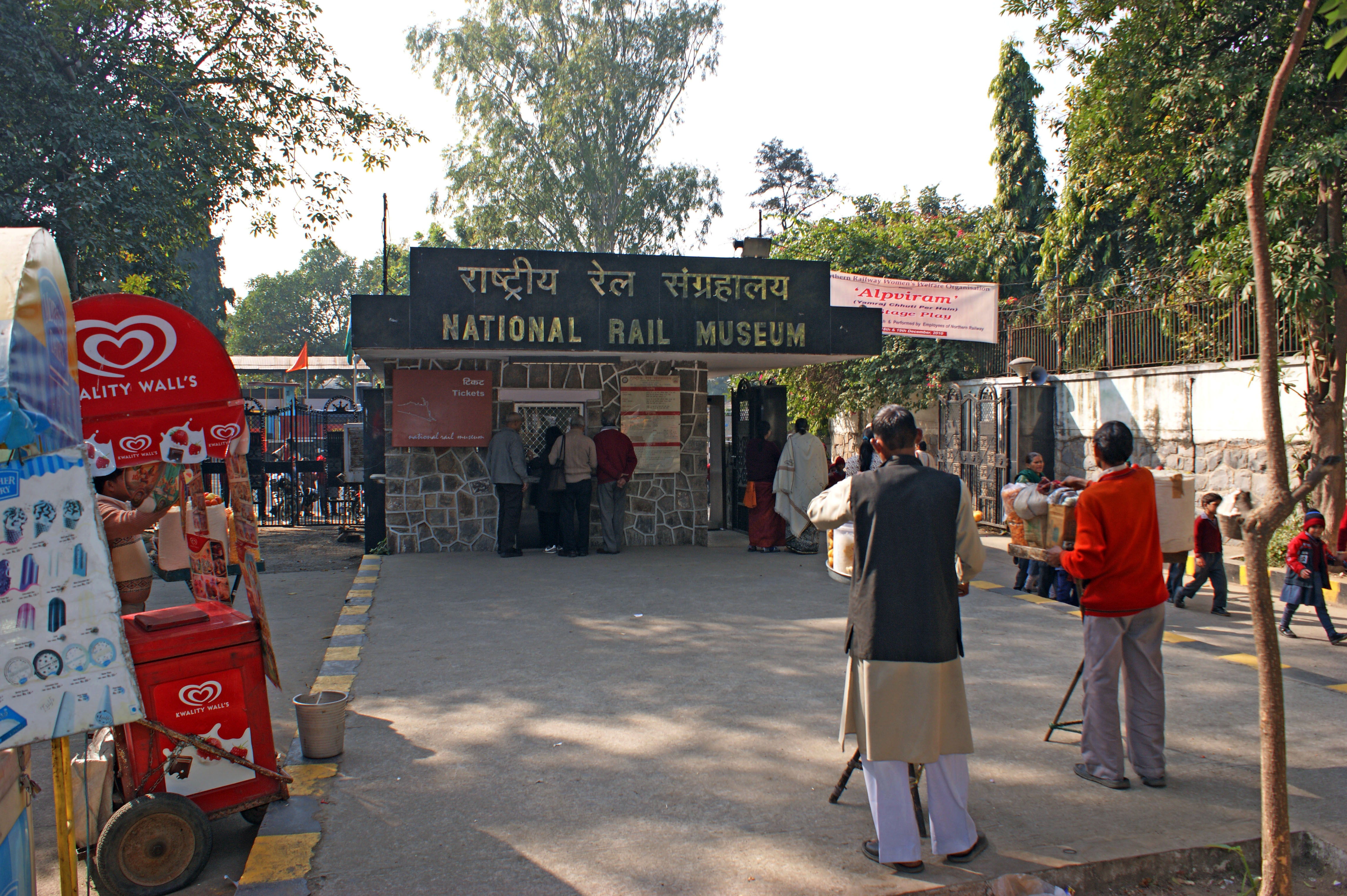 L'entrée du National Rail Museum à New Delhi.